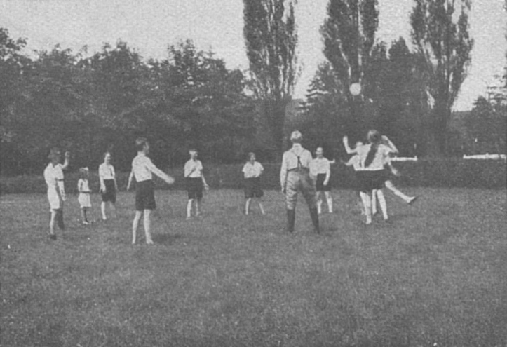 Außenabteilung Fuhlsbüttel der Hamburger Turnerschaft von 1816 beim Spiel um 1926